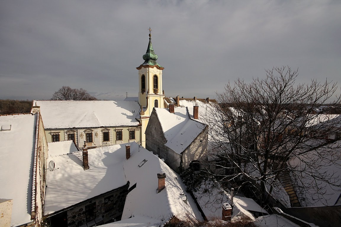 Blagovesztenszka-templom. - Szentendre